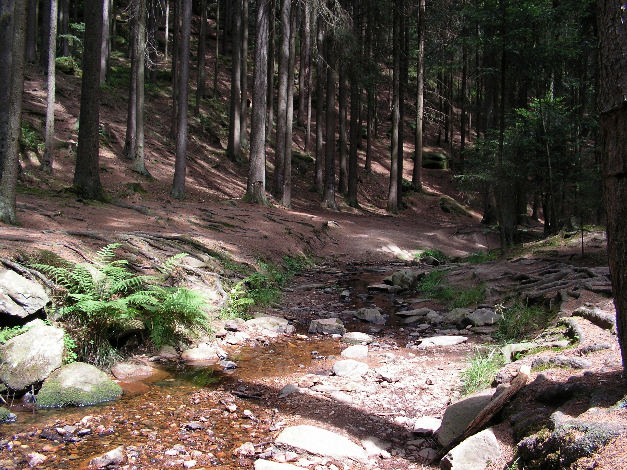 Voletínský potok v přírodní rezervaci Maštale